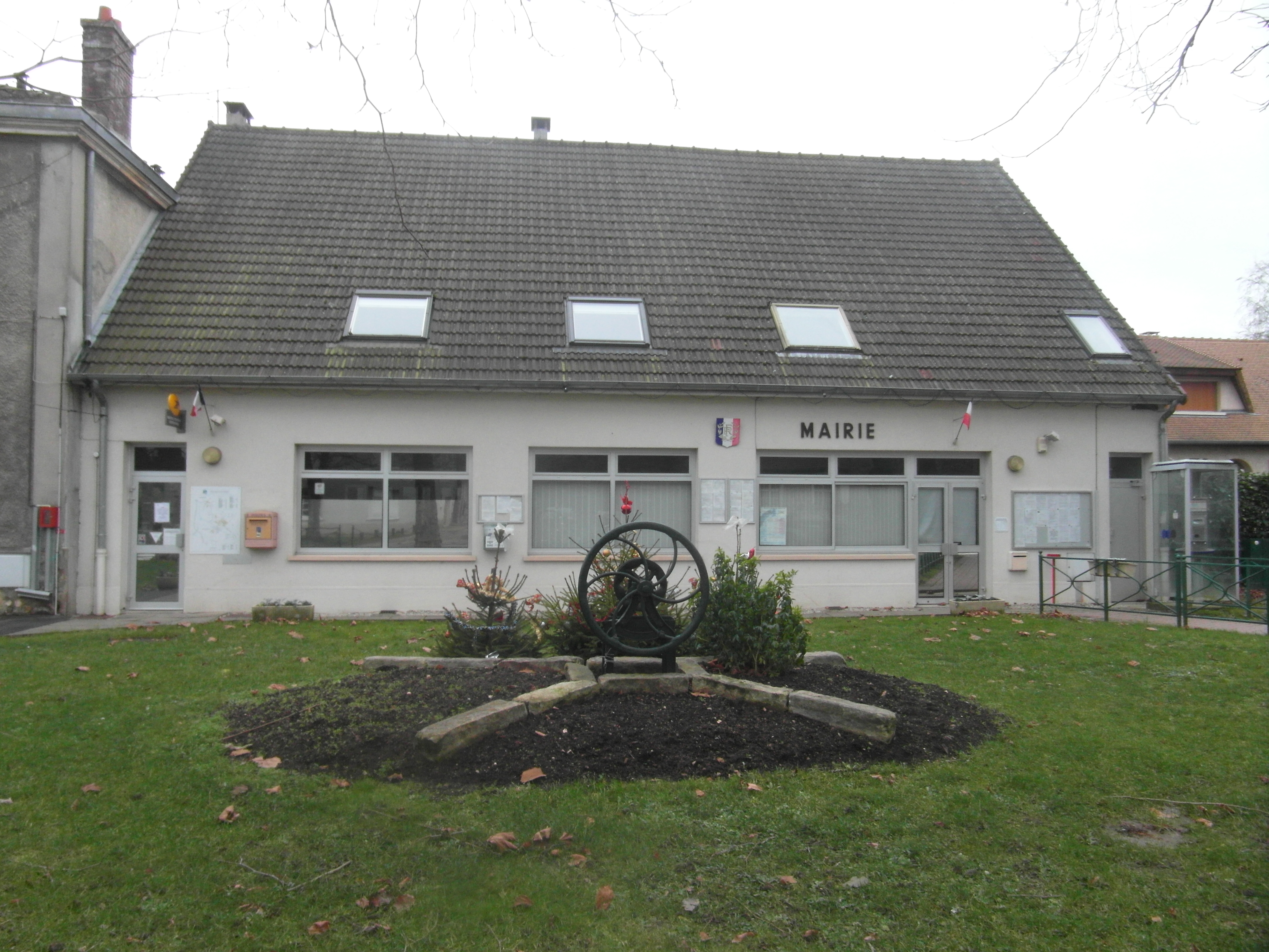 Mairie d'Évry-Grégy-sur-Yerre (Seine-et-Marne)